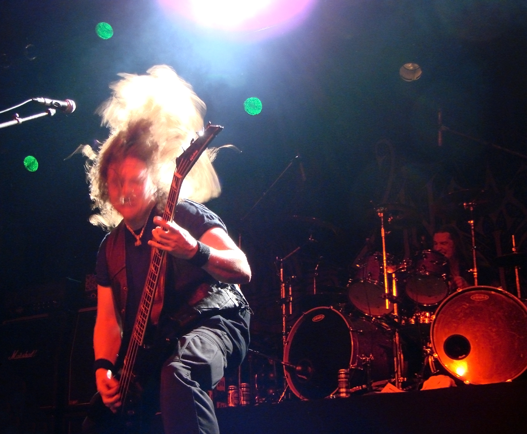 Unleashed en concert à l'Elysée-Monmartre, Paris, le 2/12/2007.